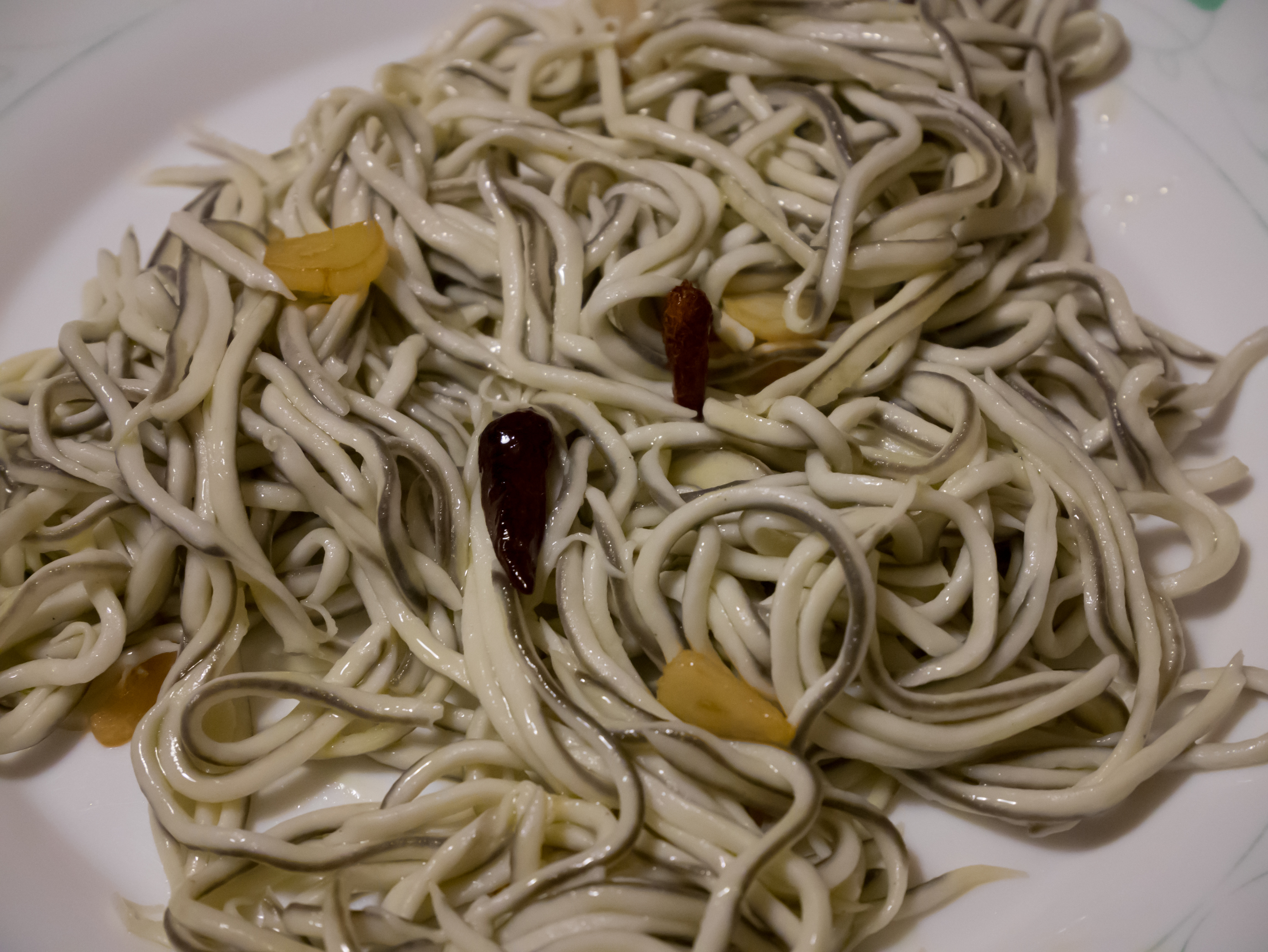 Gulas (Surimi-Nachbildung von Glasaalen) mit Knoblauch und Chilischoten, Gericht der baskischen Küche